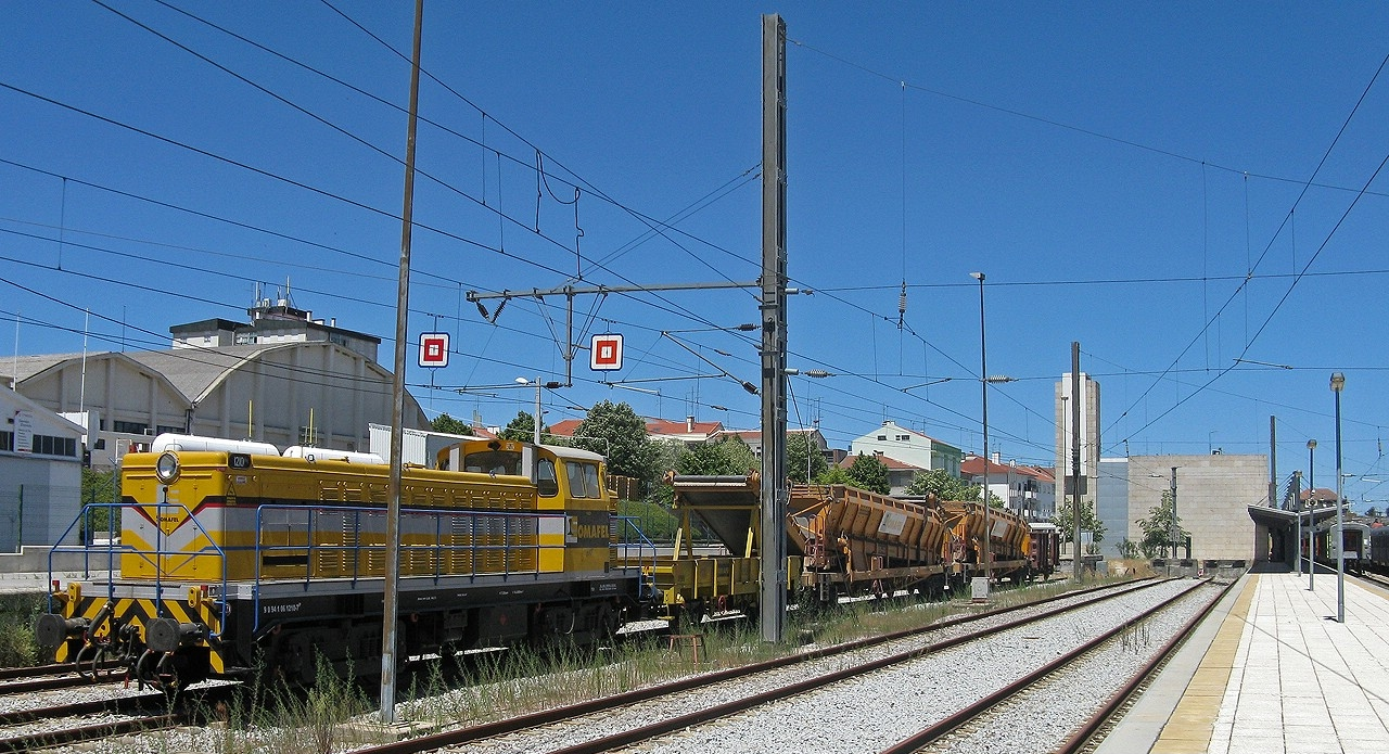 Ao serviço na obras do Covilhã - Guarda? Tem todo o ar... Brissoneau & Lotz 1210 (ex CP) da Somafel resguardada no terminus da Linha da Beira Baixa, na estação da Guarda. 26 de Julho de 2010